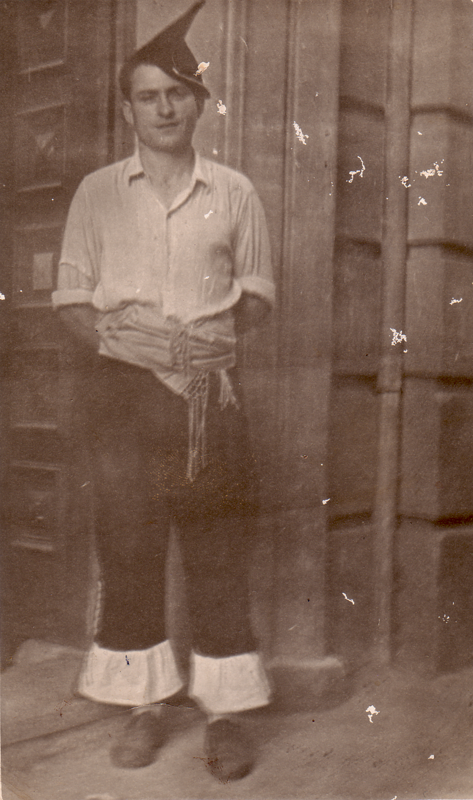 José Noriega con el traje típico de Asturias, Concurso de Canciones Regionales de España "Fiesta en el Aire", Madrid, año 1946.